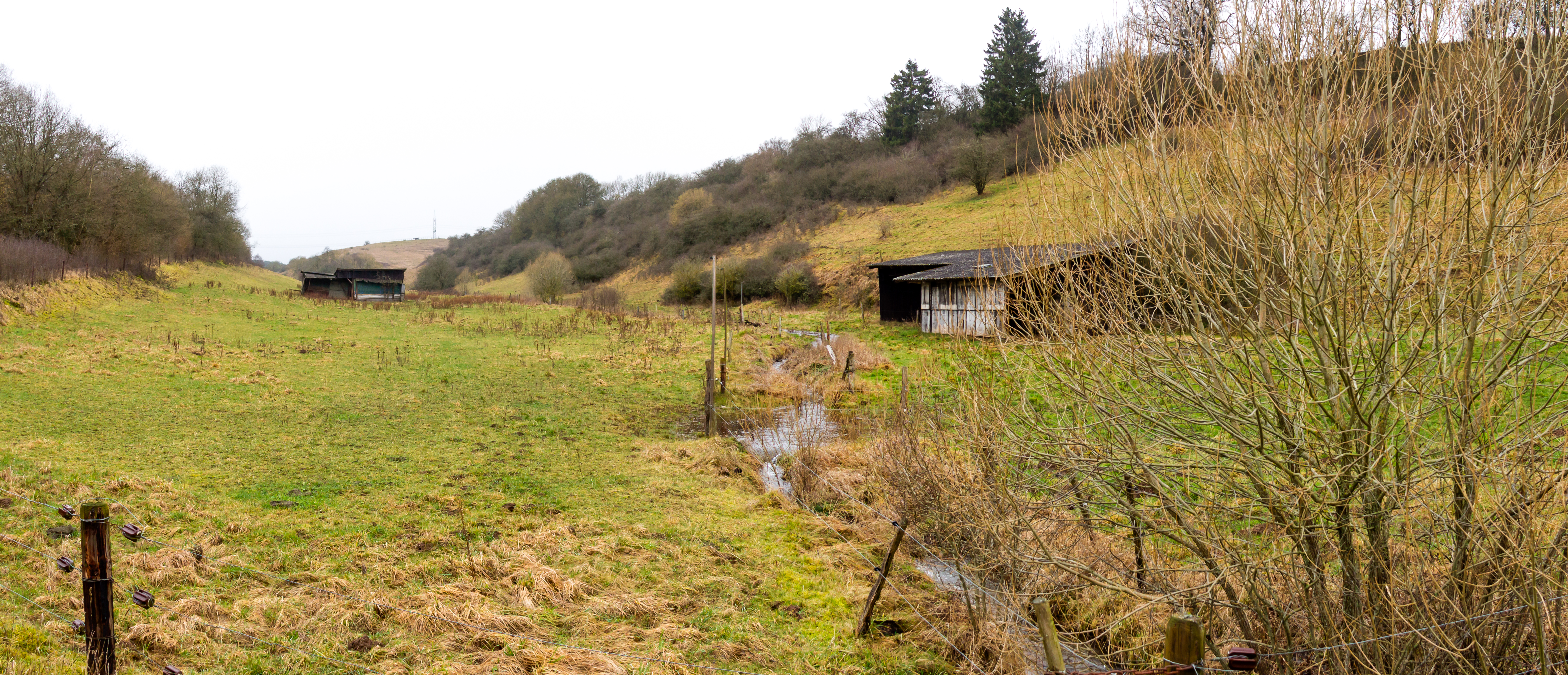 Schleifbachtal südwestlich Nettersheim, Naturschutzgebiet (EU-033). Es gehört als „Excursus“ zum Archäologischen Landschaftsparks Nettersheim.